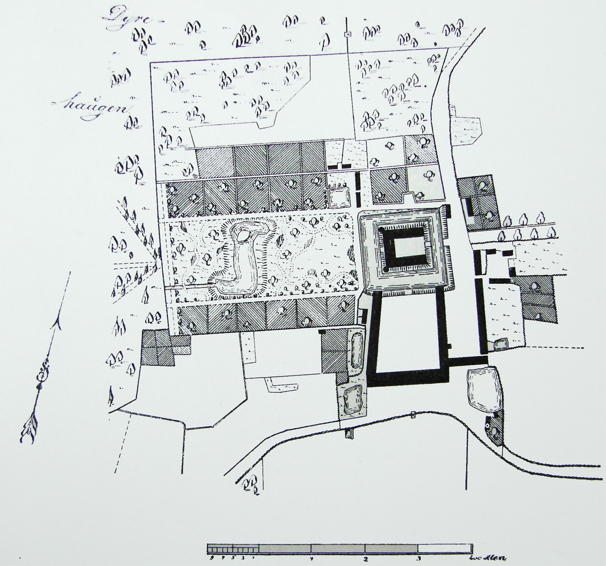 Frijsenborg Slot Hammel Sogn - Gjern Herred - Skanderborg Amt. Beliggenhedsplan 1800